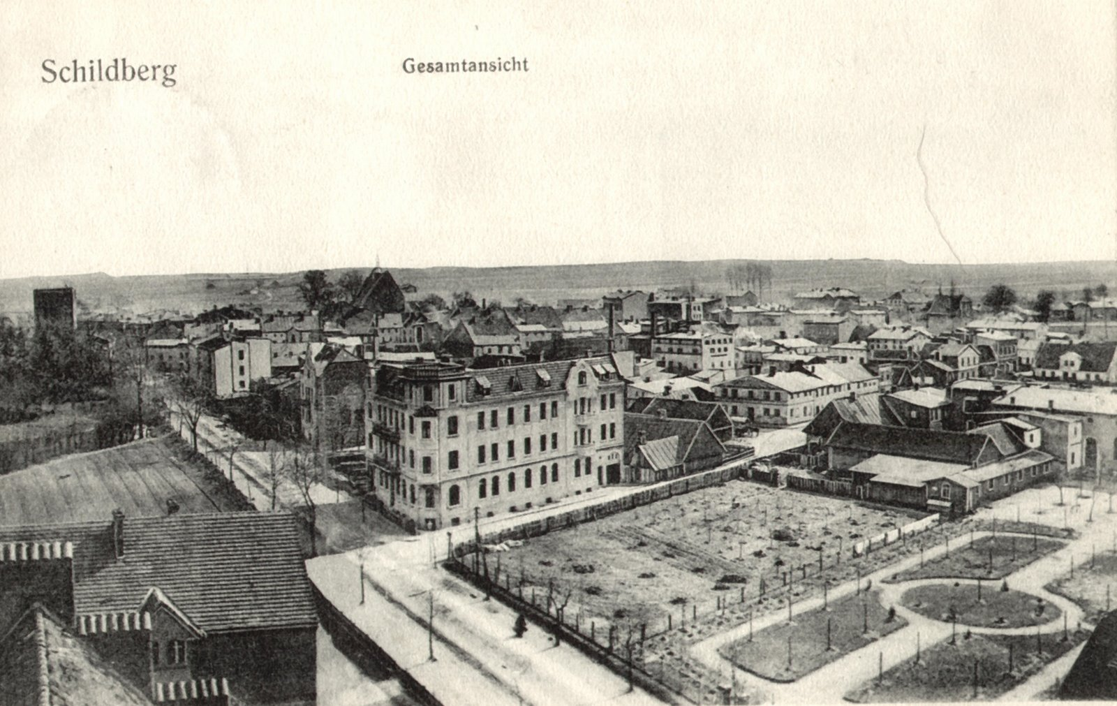 Ulica Zamkowa.